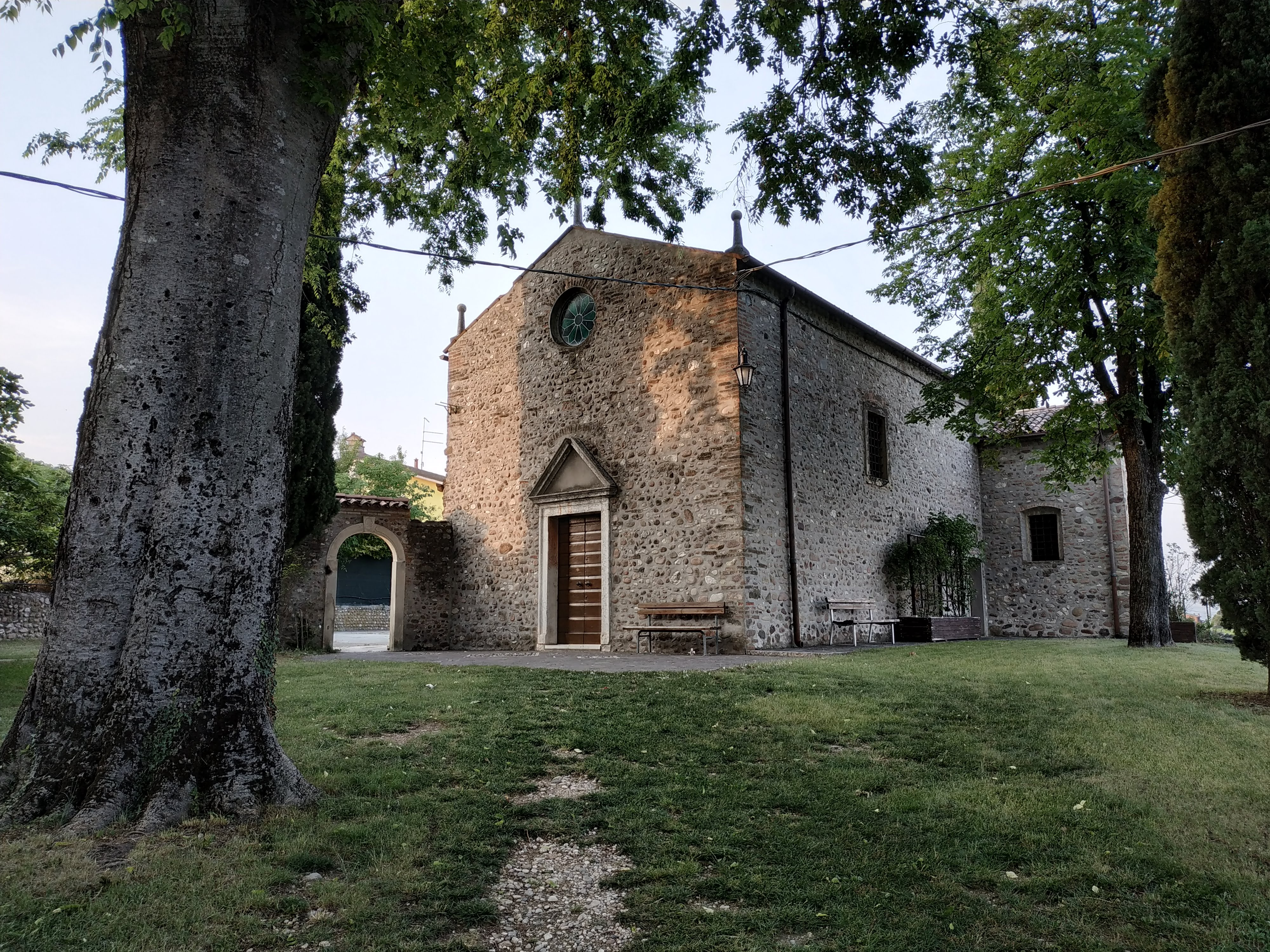 Vista della facciata e della parte antistante della chiesa di San Rocco in località Rosolotti, comune di Sona